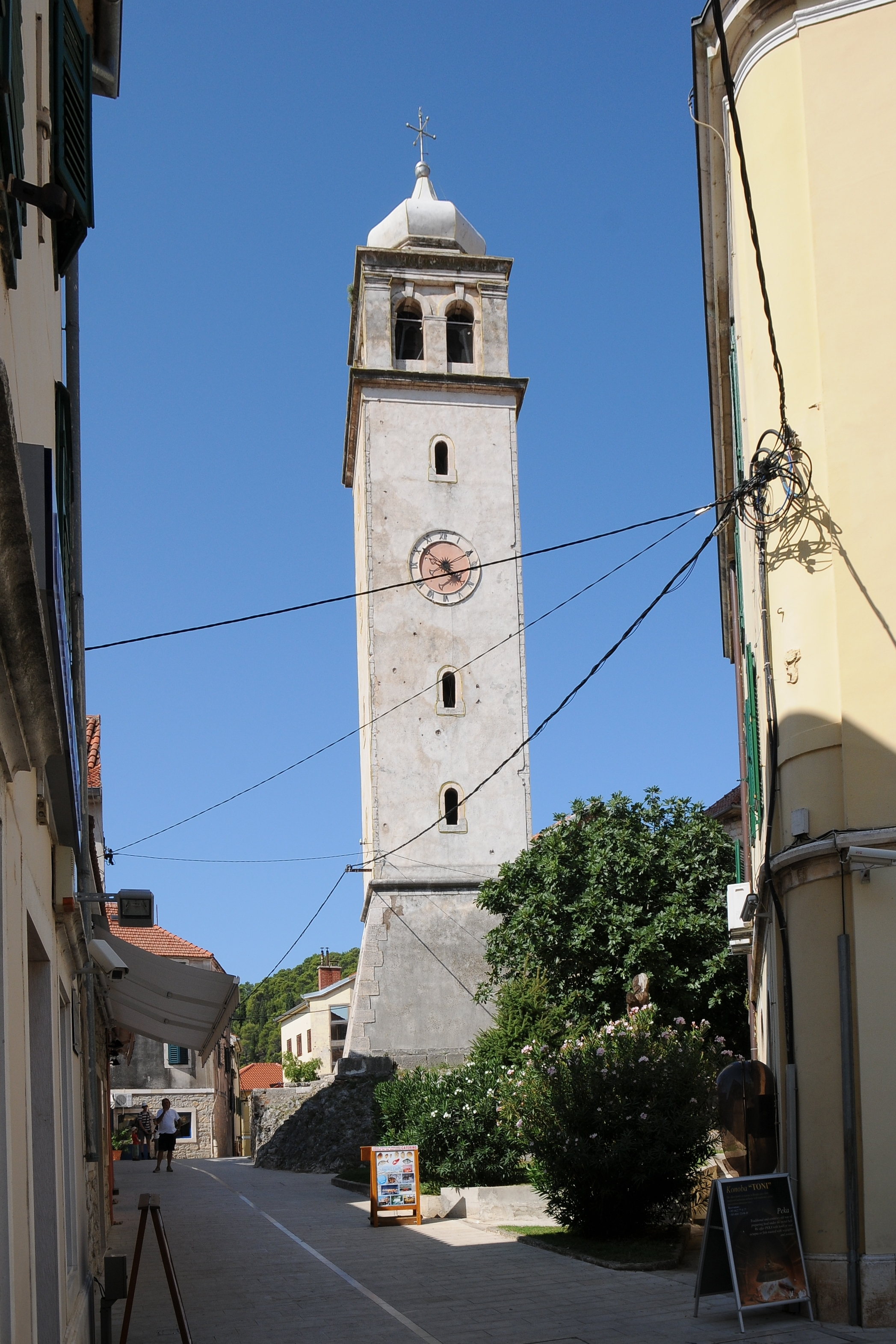 Skradin befindet sich in der Nähe Flusses Krka und grenzt an den gleichnamigen Nationalpark. Skradin ist 18 km von Šibenik und 100 km von Split entfernt. Die Hauptattraktion des Naturreservoirs Slapovi Krke ist eine Reihe von Wasserfällen, deren größter, Skradinski Buk, wurde nach der Stadt benannt.